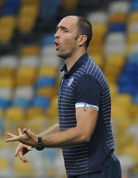 Игра против Днепра.